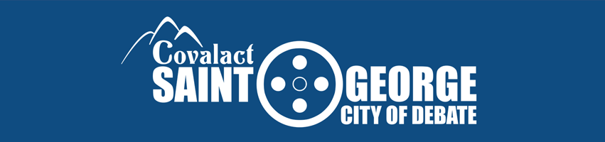 Logo oficial SGCoD14